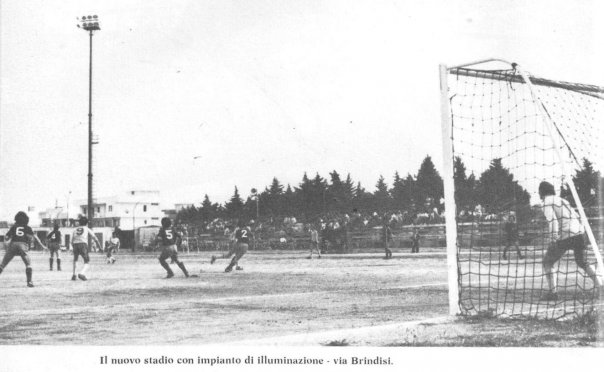 FOTO STORICA